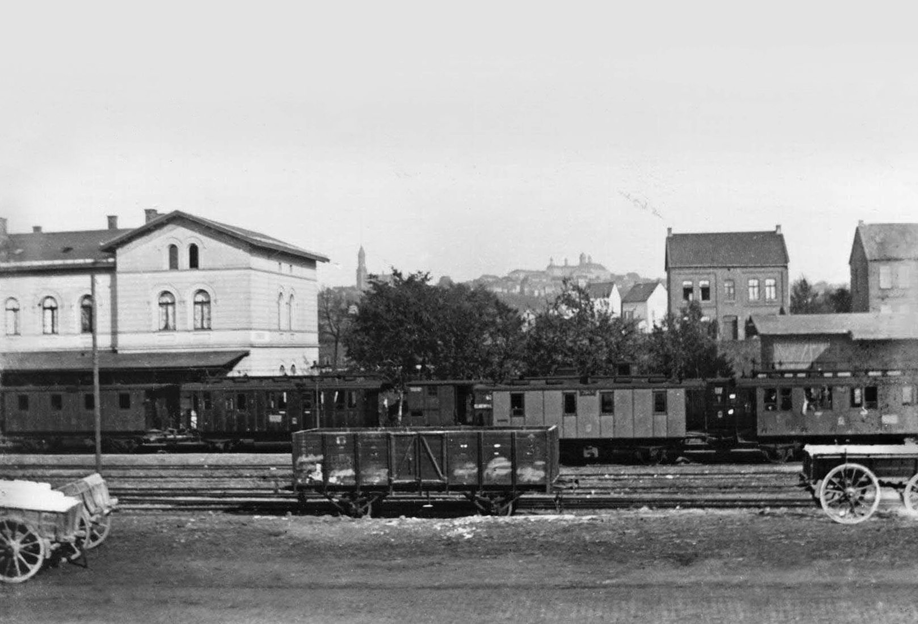 Bahnhof Bensberg am 26. Oktober 1899